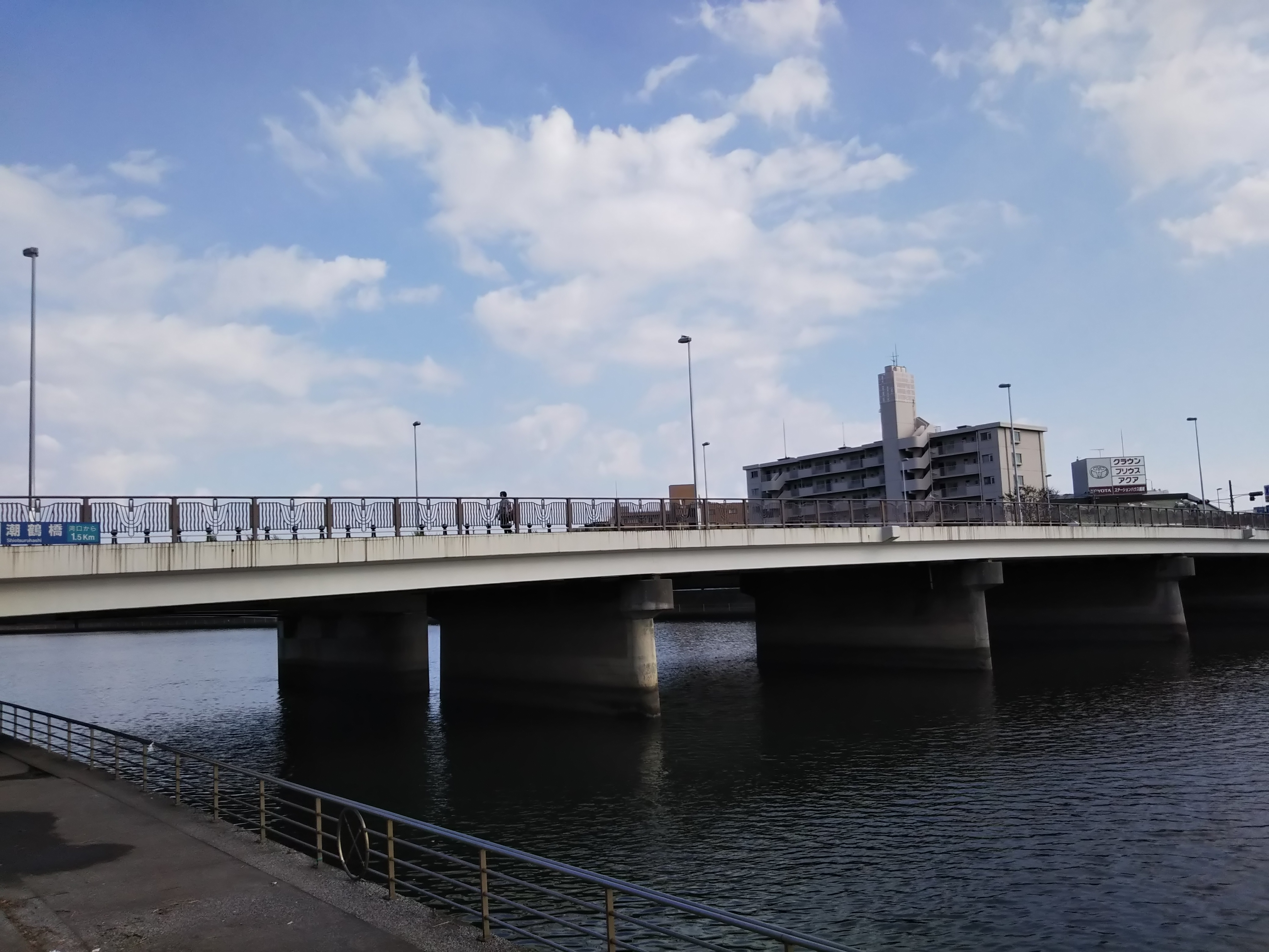 神奈川県横浜市鶴見区。鶴見川に架かる潮鶴橋